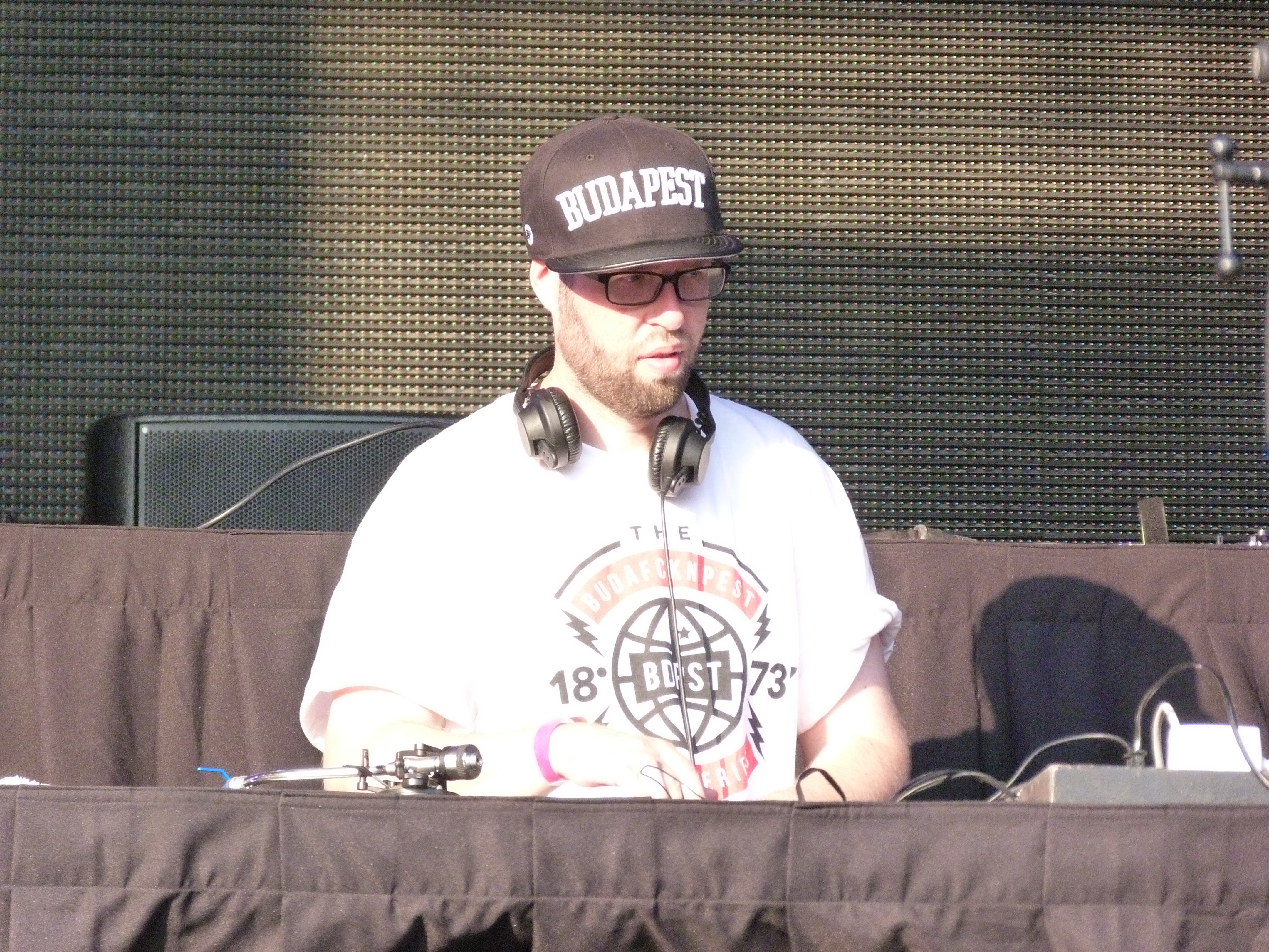 A felvétel 2015. július 7-én kedden készült Budapesten, a Budapest Parkban. DJ Kool Kasko. A Wu-Tang Clan zenekar, előzenekarok: Kool Kasko & friends: DJ Kool Kasko-Spnfre Cypher MC-k: AKPH, Egyenlők (Vészk'járat és Jambalaya), Killakikitt Feat. NKS, Bankos és barátai ©© Derzsi Elekes Andor, Budapest, 2015, A fénykép másolását és felhasználását a szerző ellenérték nélkül megengedi. Az engedély kiterjed a kereskedelmi célú hasznosításra is. Kéri azonban nevének feltüntetését a felhasználás során. A Metapolisz sorozat valamennyi képe és filmje Creative Commons alatti. kereskedelmi - for profit - célra is felhasználható. Közzétéve a Metapolisz DVD sorozatban. Ajánlott hivatkozás: Derzsi Elekes Andor: Metapolisz DVD line